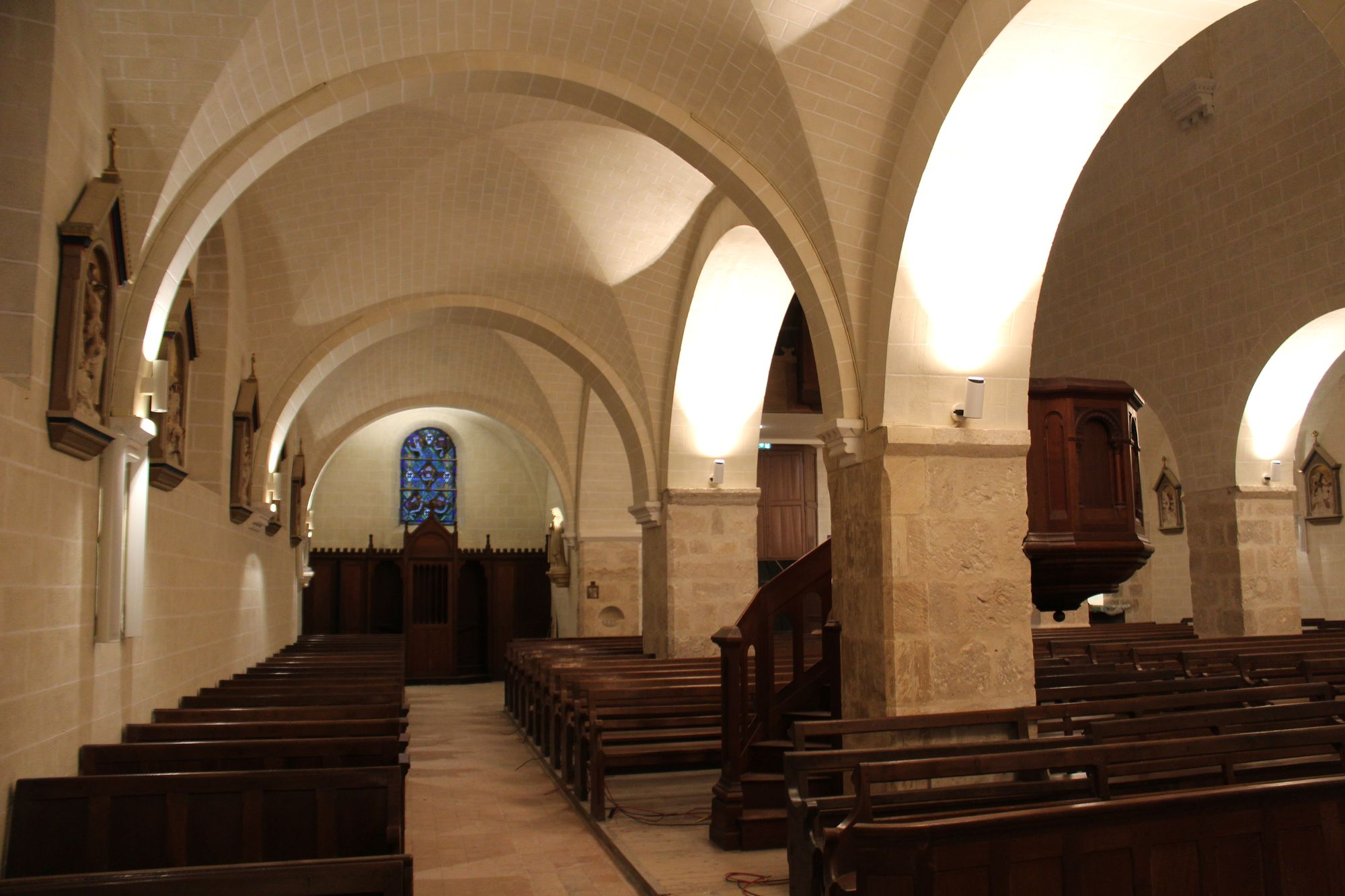 Intérieur de l'église Saint-Mesmin restaurée en 2018